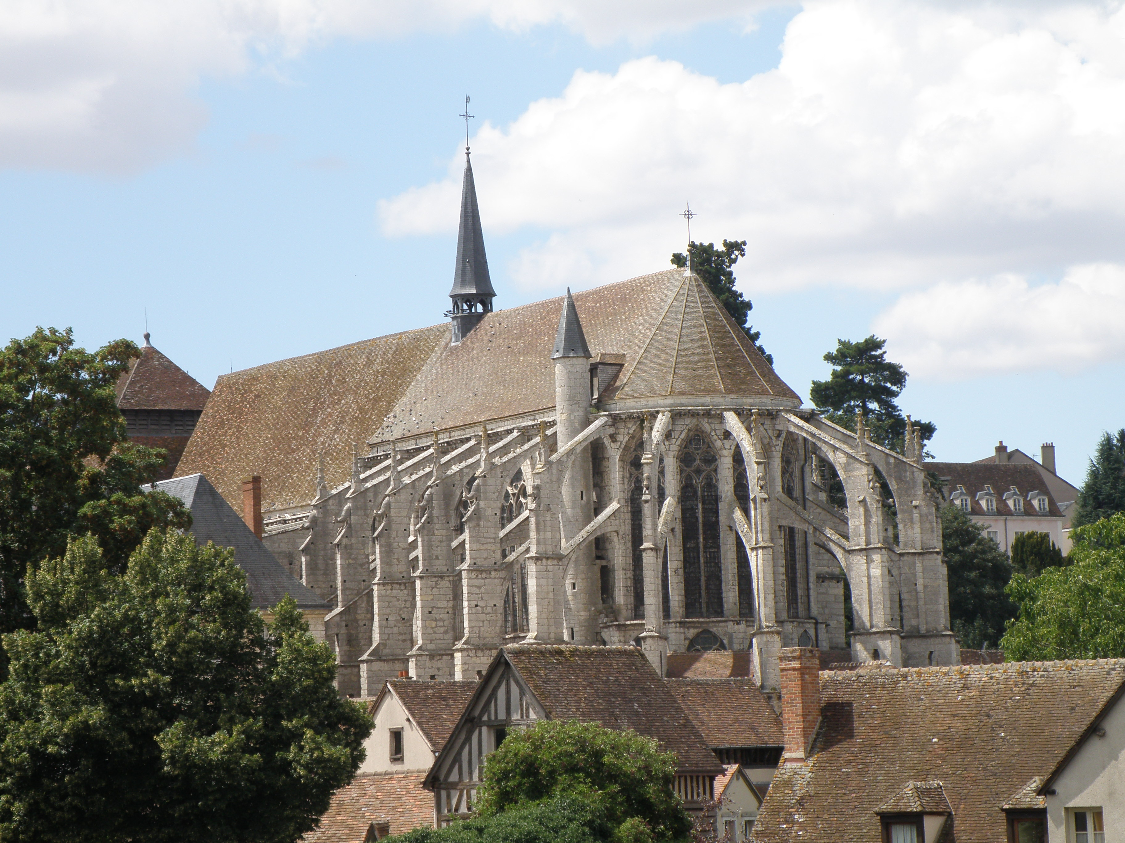 Вид на церковь сен-Пьер с моста